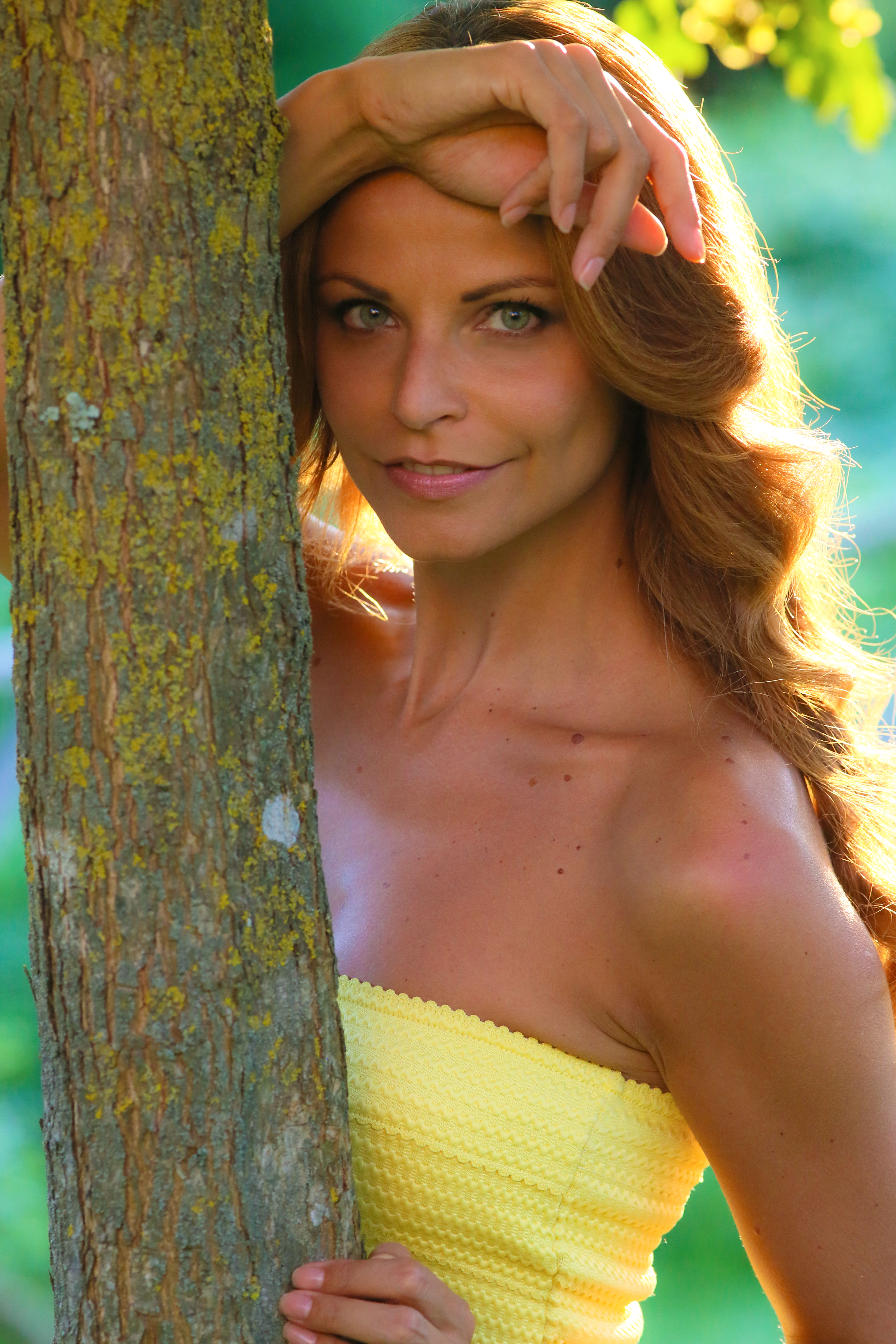 tiziana de giacomo